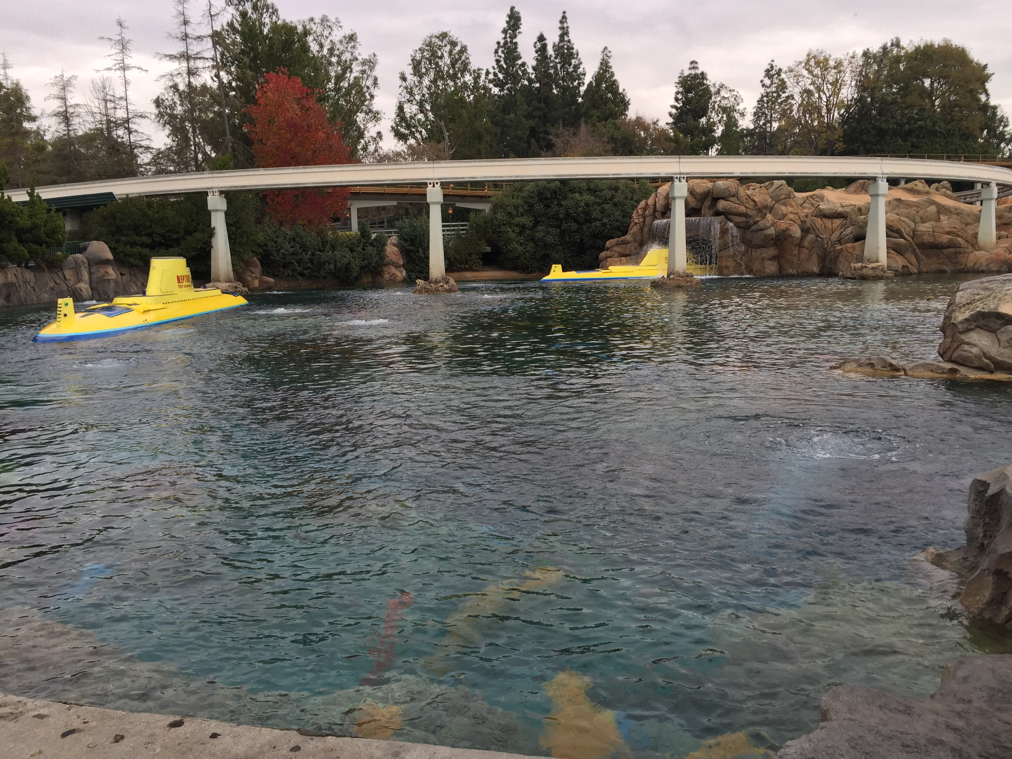 Disneyland